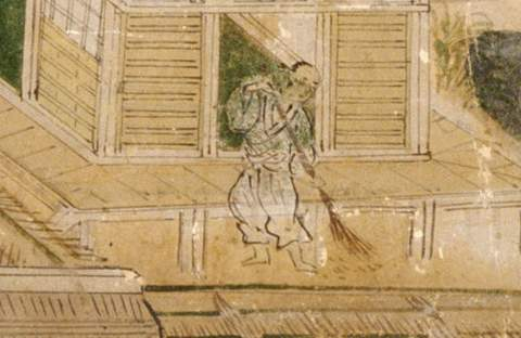 洛中洛外図屏風、狩野元信、1520年代